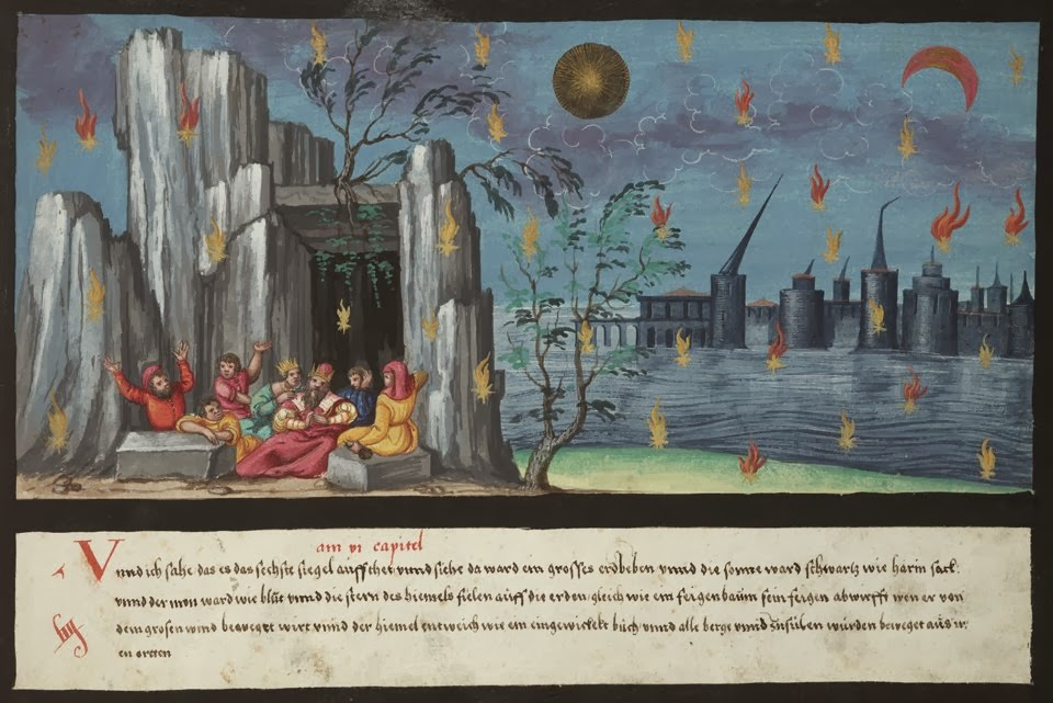 Augsburger Wunderzeichenbuch